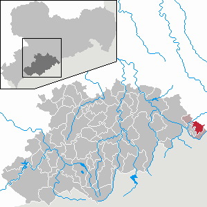 Seiffen/Erzgeb. im Erzgebirgskreis, Sachsen